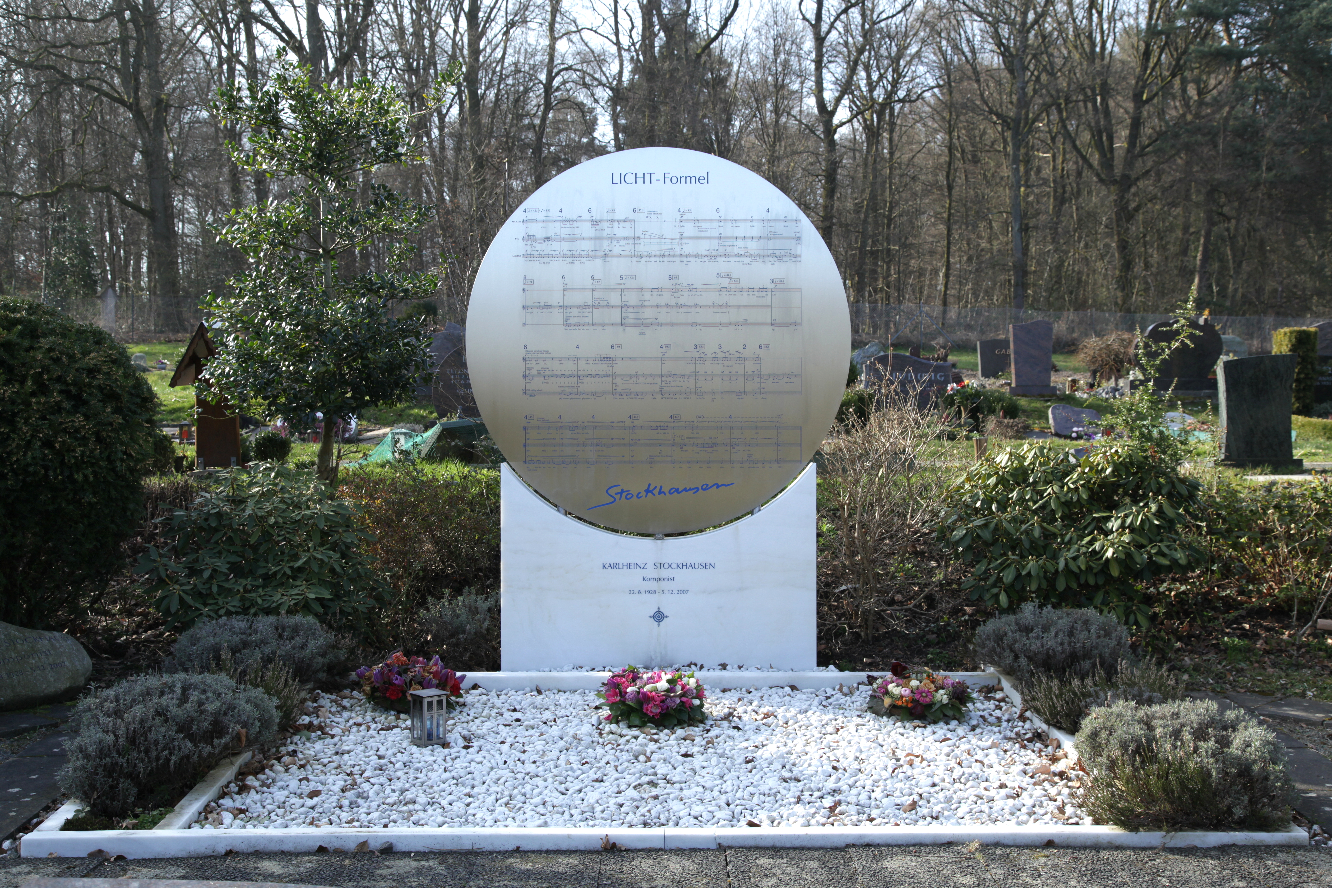 Karlheinz Stockhausens Grab auf dem Waldfriedhof in Kürten